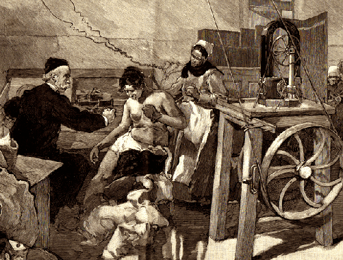 Romain Vigouroux pratiquant l'électrothérapie à la Salpêtrière. Détail d'une gravure de Daniel Vierge pour le Monde illustré (1887)